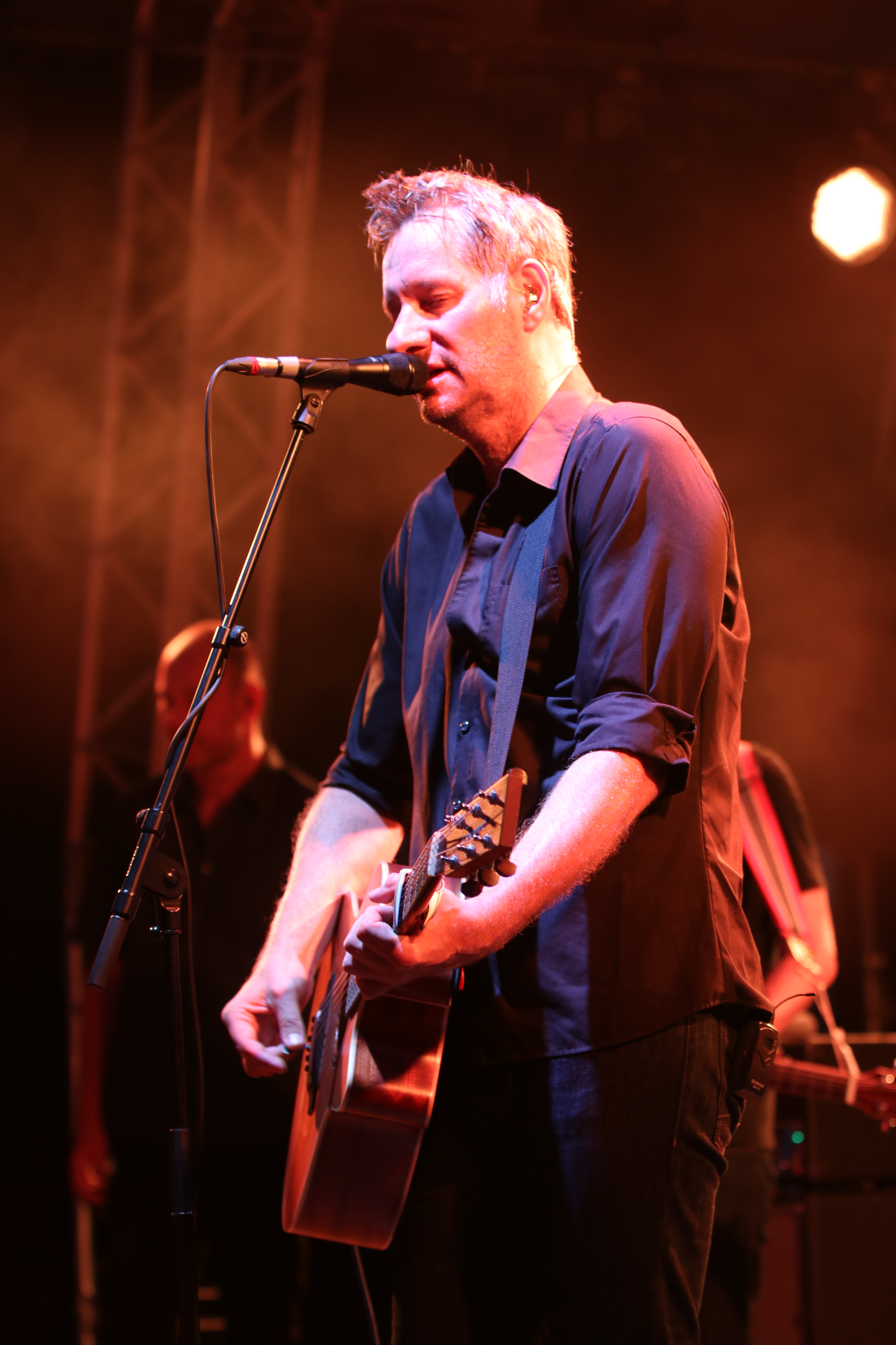 Kettcar am 17. August 2018 im Münchner Theatron. Marcus Wiebusch